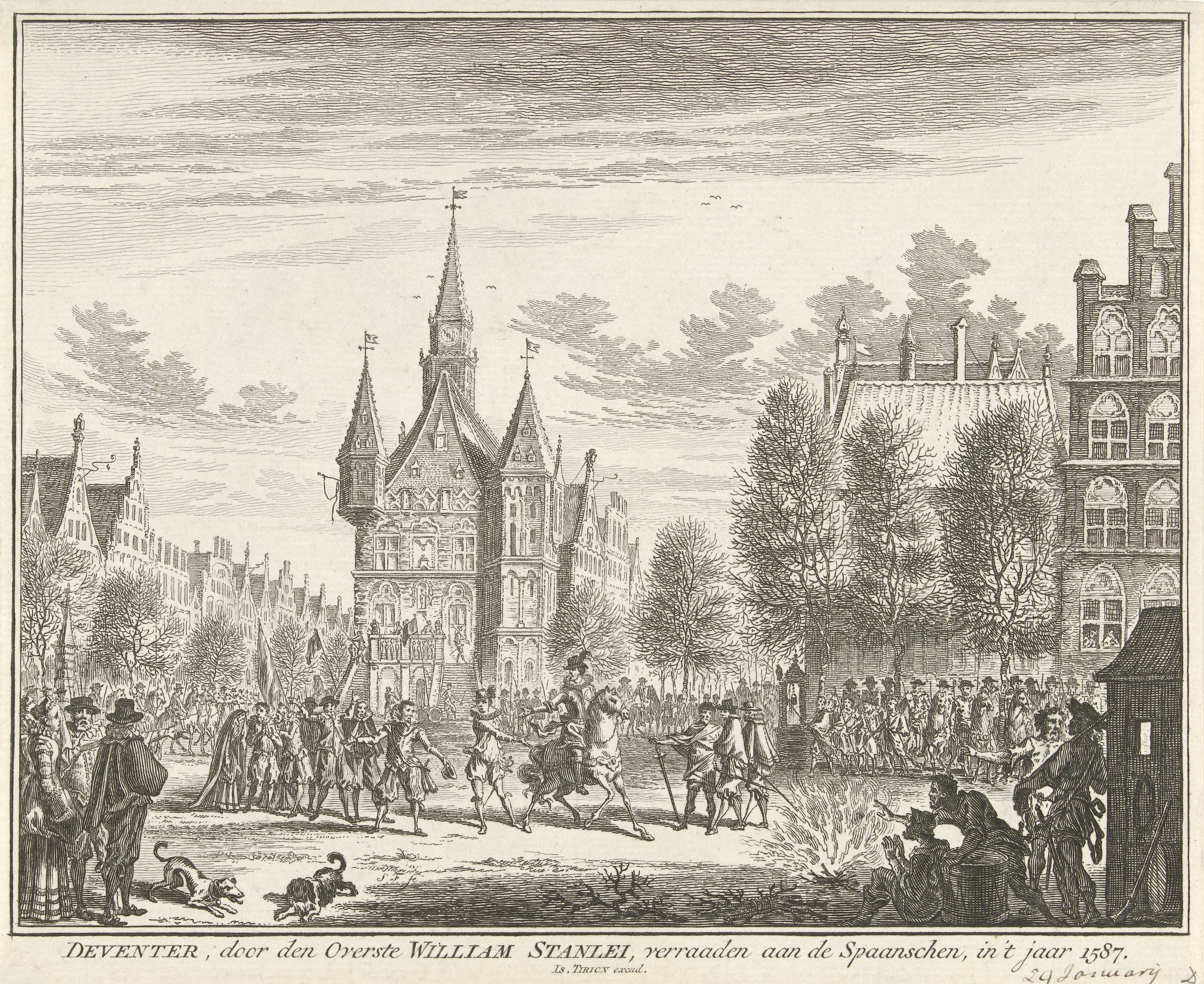 IdentificatieTitel(s): Deventer door verraad van William Stanley in Spaanse handen, 1587Deventer, door den Overste William Stanlei, verraaden aan de Spaanschen, in 't jaar 1587 (titel op object)Objecttype: prent Objectnummer: RP-P-OB-50.770Catalogusreferentie: FMH 956-aOpschriften / Merken: verzamelaarsmerk, verso, gestempeld: Lugt 2228Omschrijving: Deventer gaat door het verraad van de Engelse overste William Stanley over in Spaanse handen. Soldaten op de Brink voor de Waag.VervaardigingVervaardiger: prentmaker: Simon Fokke (vermeld op object)uitgever: Isaak Tirion (vermeld op object)Plaats vervaardiging: AmsterdamDatering: 1729 - 1766Fysieke kenmerken: etsMateriaal: papier Techniek: etsenAfmetingen: blad: h 163 mm × b 197 mmOnderwerpWat: treasonTachtigjarige OorlogWanneer: 1587-01-30 - 1587-01-30Waar: DeventerWie: Sir William StanleyVerwerving en rechtenVerwerving: onbekendCopyright: Publiek domein